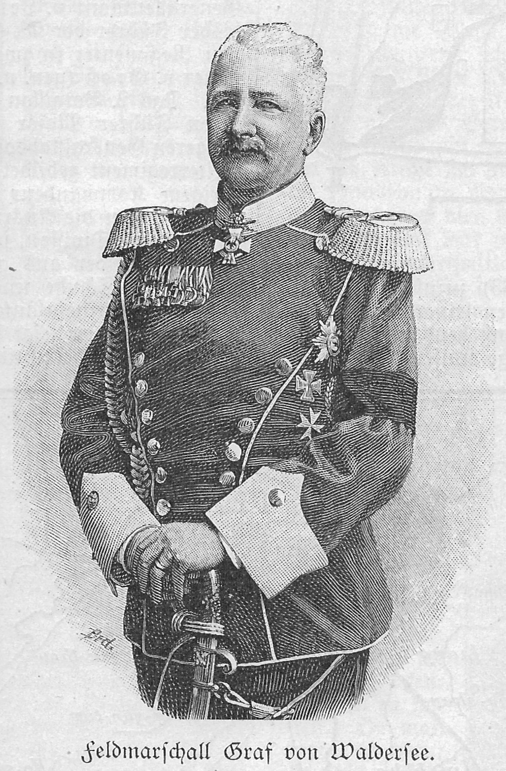 Alfred von Waldersee (1832-1904)